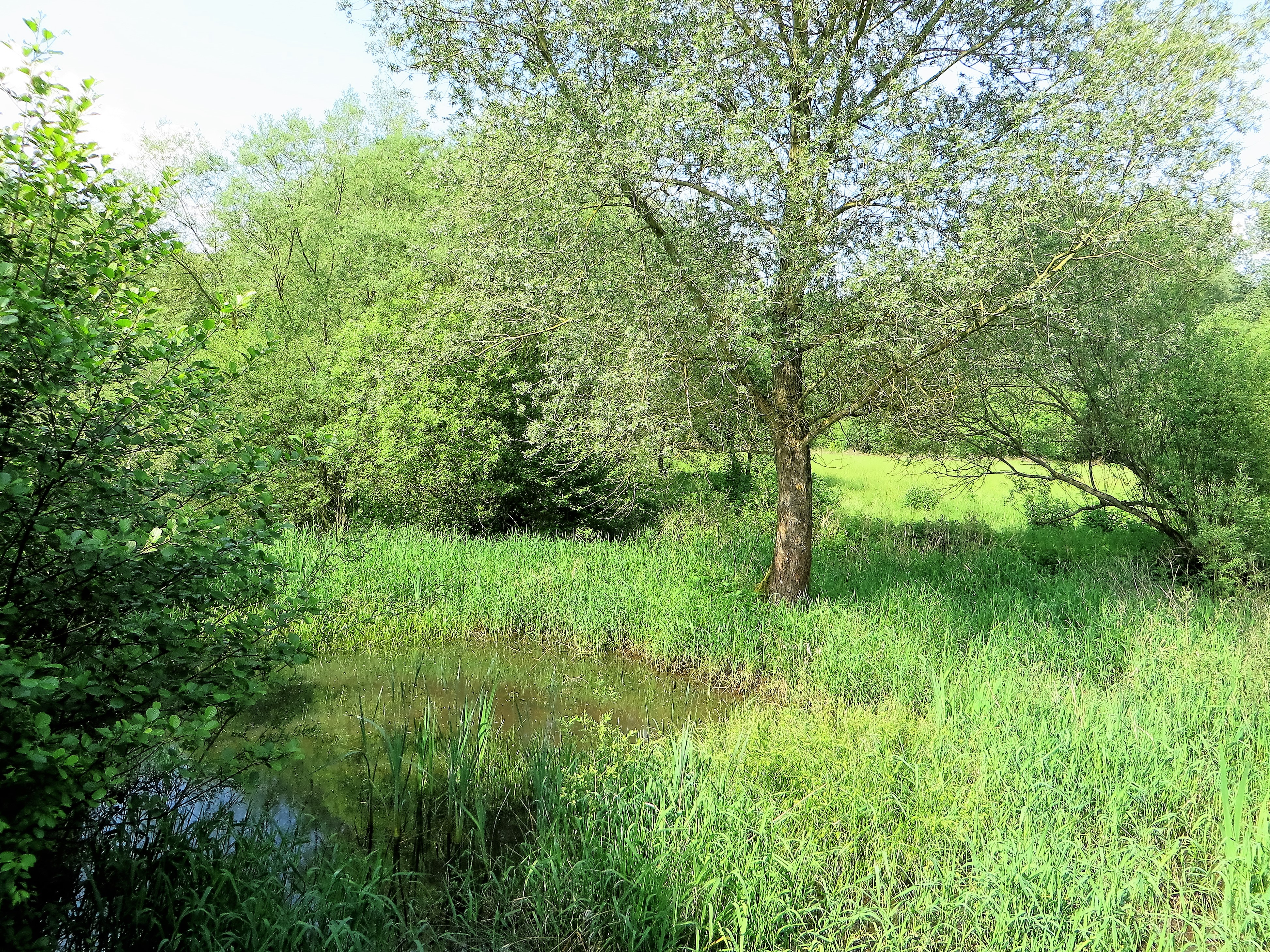 Naturschutzgebiet „Lenneaue Berchum“ (HA-012) in Hagen-Berchum. Blick von der Aussichtshütte am Rad- und Wanderweg auf das Flachgewässer, umgeben von Streuobstwiese und Erlenwald. Es handelt sich um einen Altarm der Lenne, der nach der Lennekorrektur vom Fließgewässer abgeschnitten wurde, Fragmente des ehemaligen Auwaldes und extensiv genutzte Obstwiesen und Wiesen. Im Südwesten wird das Gebiet vom Lennedeich, im Norden und Nordosten von der Verbandsstraße und vom Unterlauf des Wannebaches begrenzt.